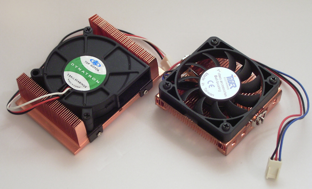 Zwei besonders flache Prozessorkühler aus Vollkupfer für 19-Zoll-Gehäuse mit einer Höheneinheit. Links für Intel Xeon (Sockel 603) mit Radiallüfter, rechts für AMD/Intel (Sockel A, Sockel 370)